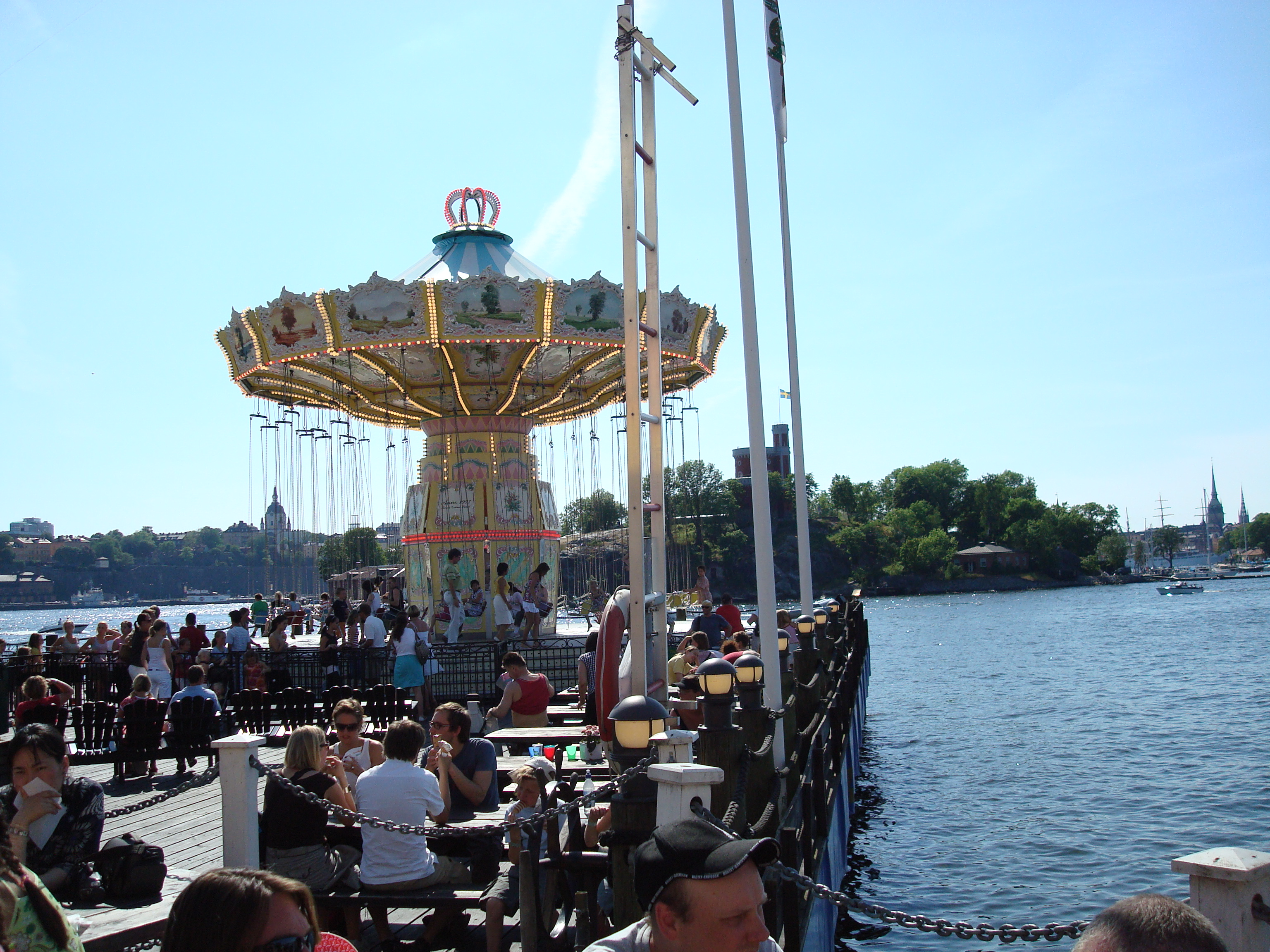 Kättingflygaren Gröna Lund 2007-06-09